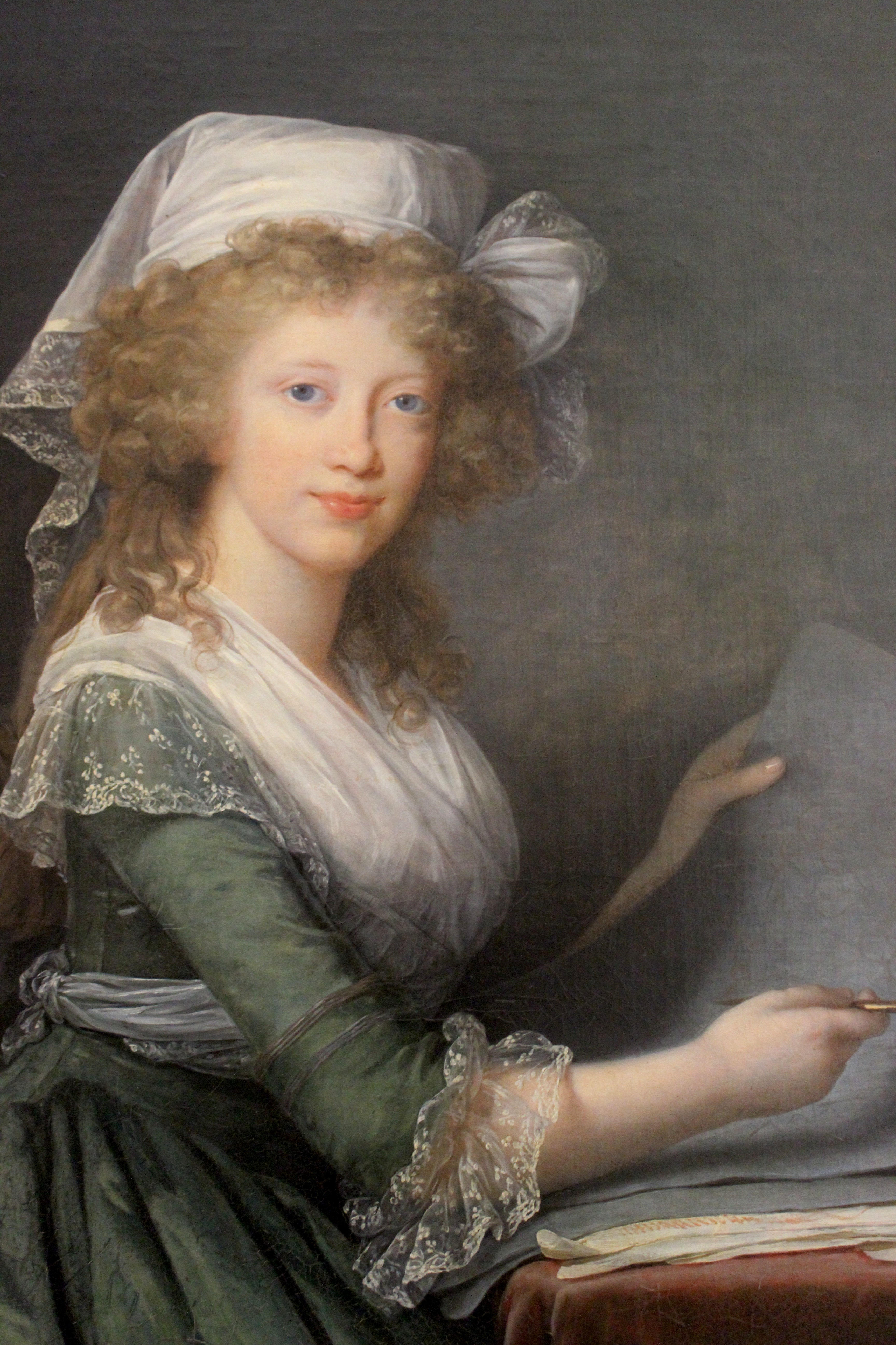 Nápoles. Museo de Capodimonte. María Luisa de Nápoles y Sicilia por E. Vigée-Lebrun.